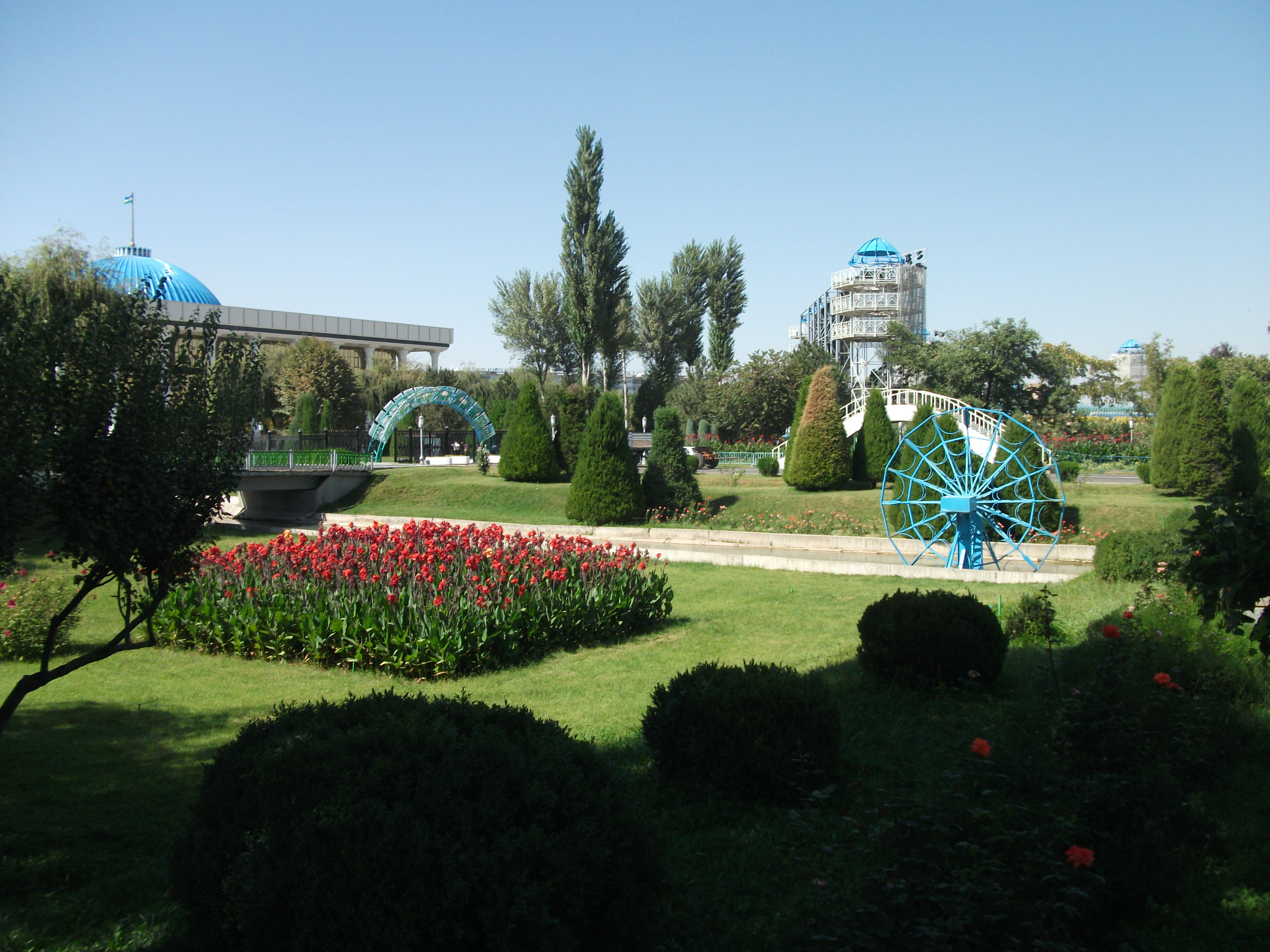 Национальный парк, Ташкент